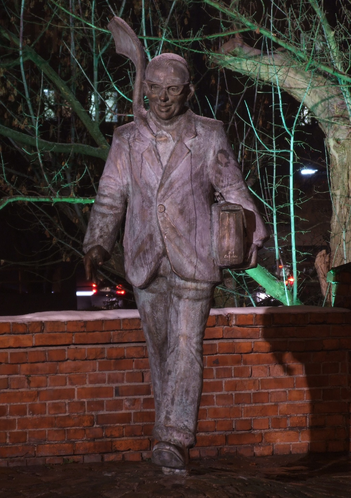 Pomnik Papy Musioła w Opolu po zmroku. Autor: Wit Pichurski, kwiecień 2008